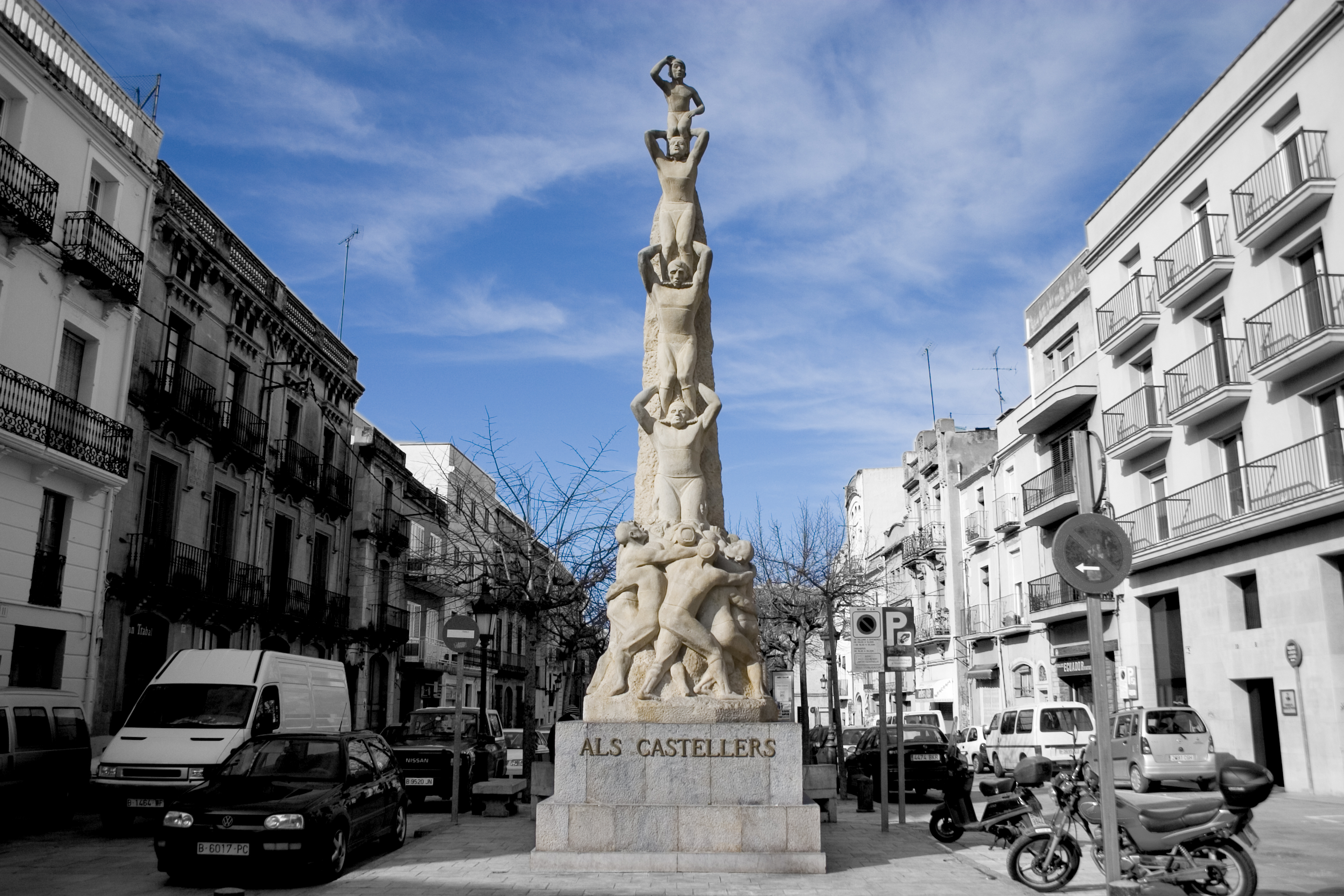 Monument als Castellers, Vilafranca del Penedès, Alt Penedès, Catalunya.